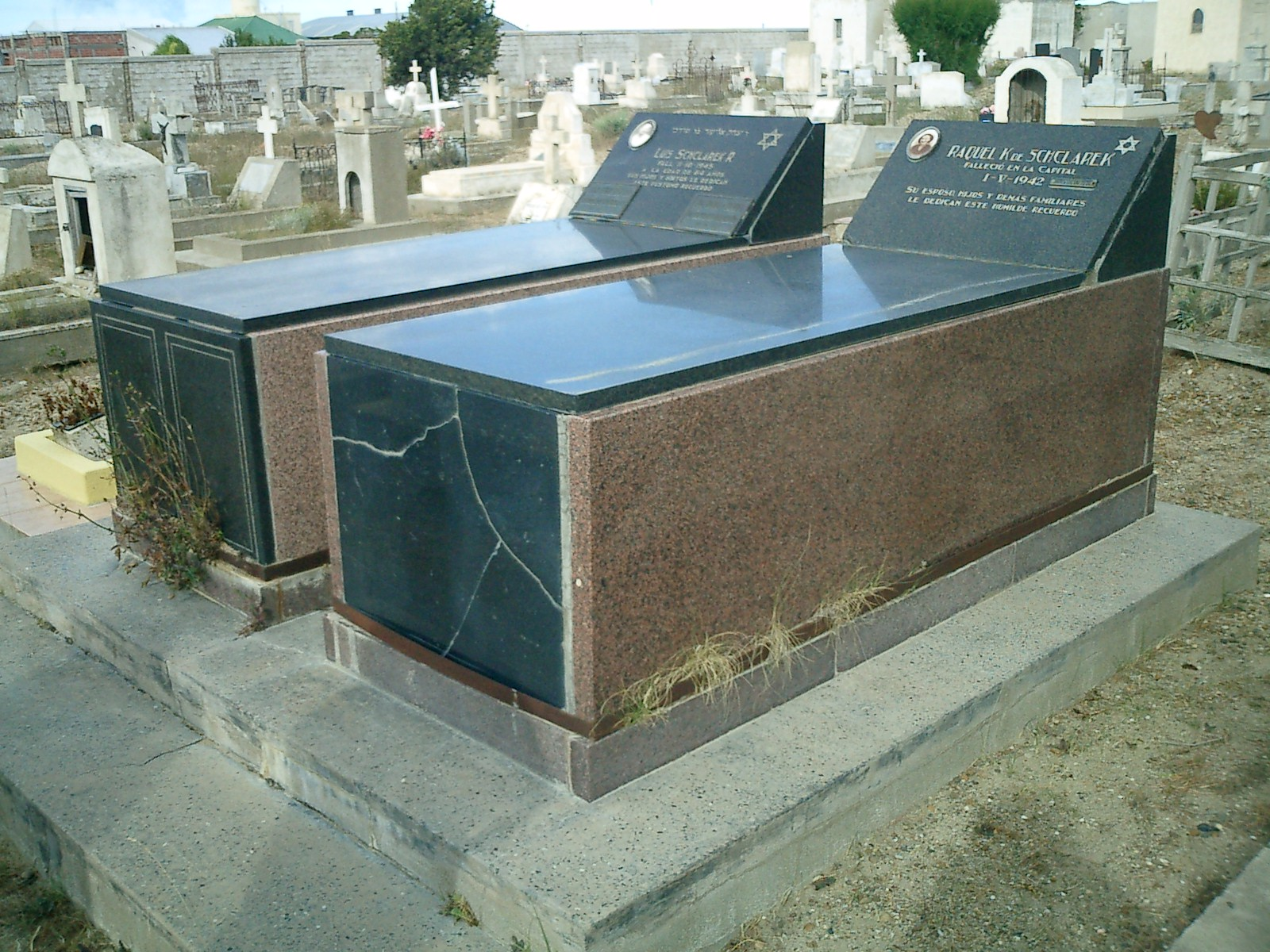 Cementerio de Puerto San Julián